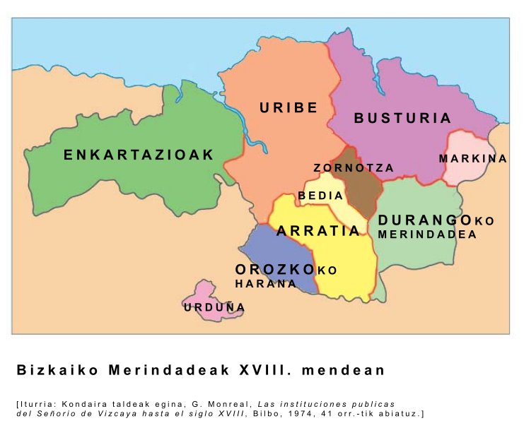 Bizkaiko merindadeak XVIII. mendean, UEUren kondaira.eus webgunetik hartua.